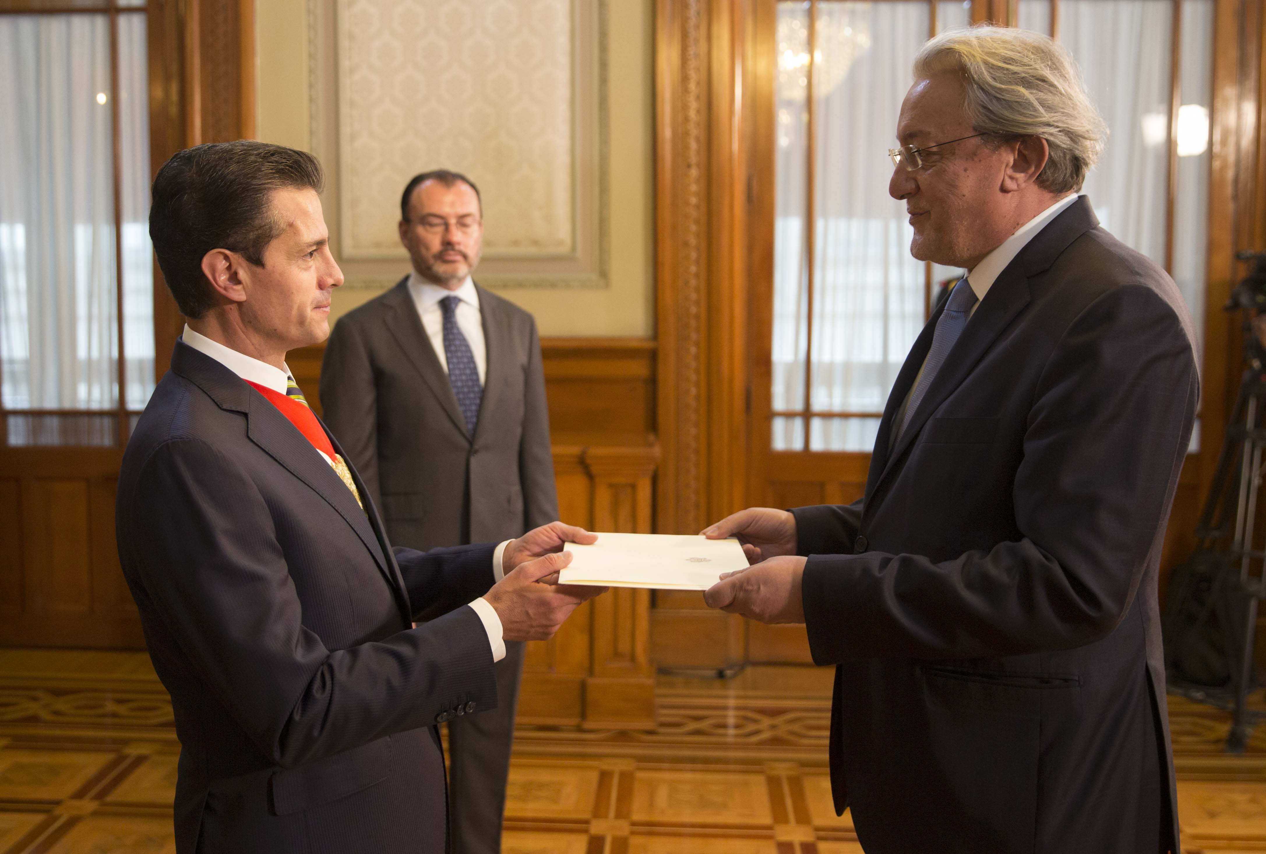 El Presidente Enrique Peña Nieto recibió las cartas credenciales de nuevos Embajadores que iniciaron así sus actividades oficiales como representantes de sus países en México.